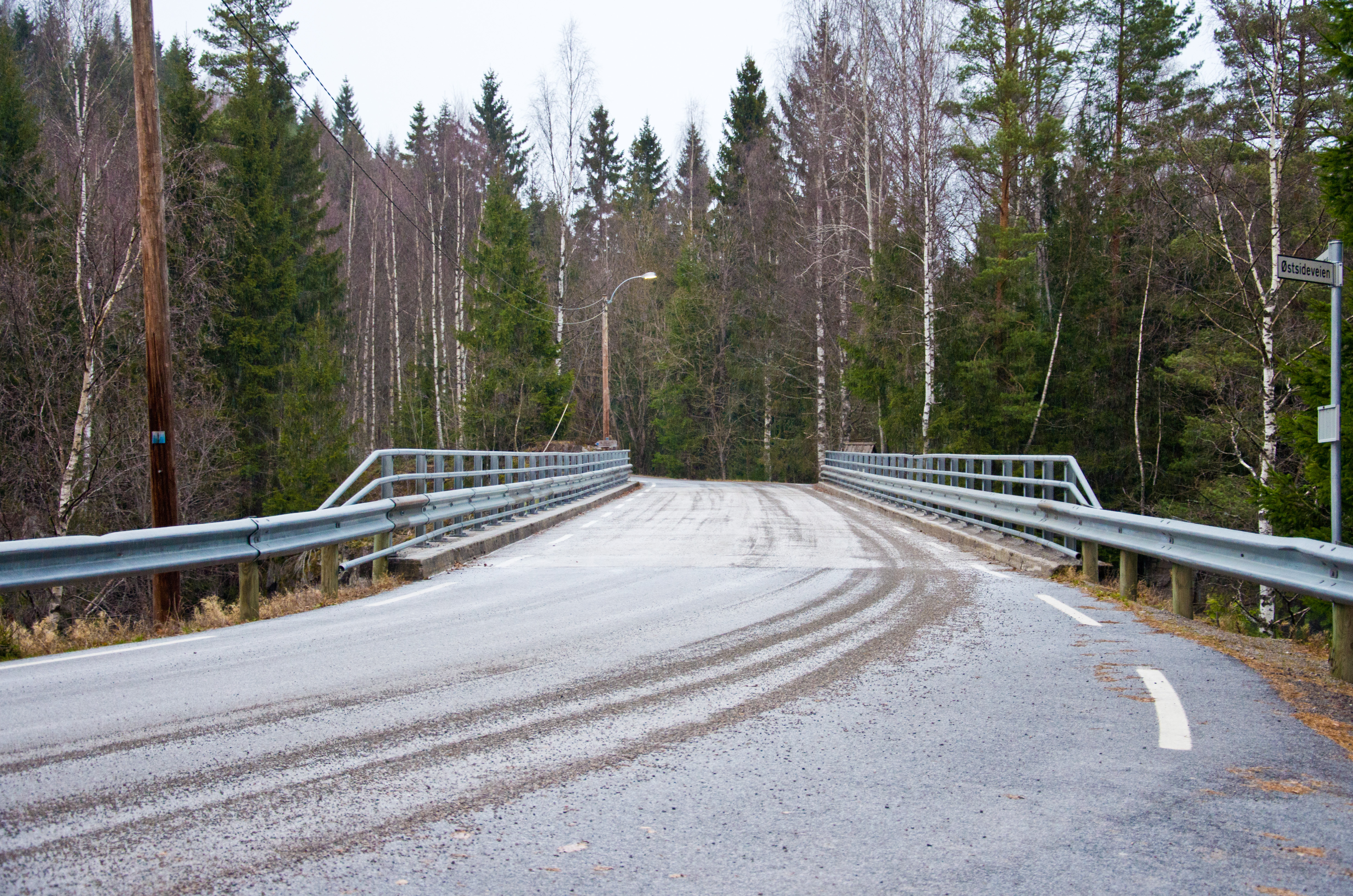 Fylkesvei 865 Brufossbru over Lågen i Brufoss, Lardal, Vestfold